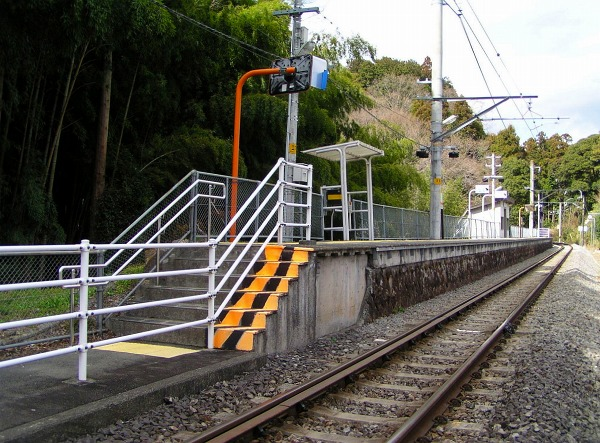 Numakubo Station on Minobu Line